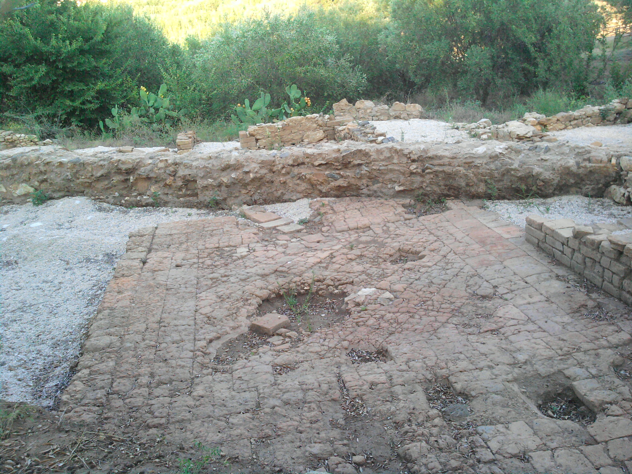 Casa del Mosaico all'interno del Parco Archeologico dei Tauriani di Palmi